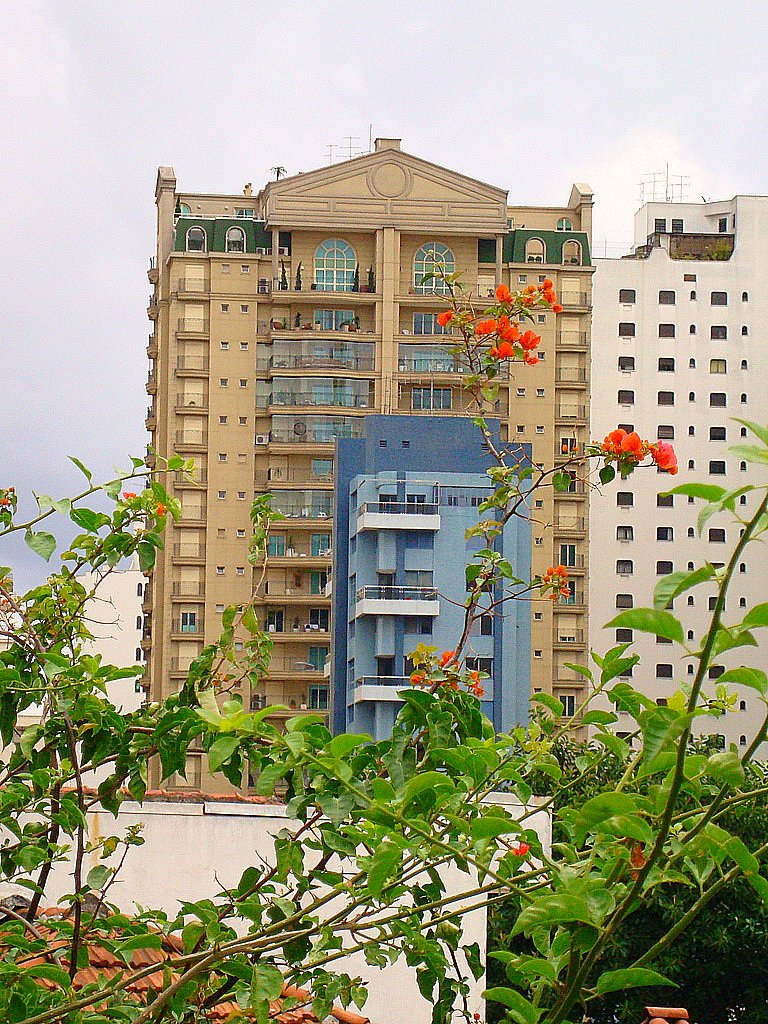 Alto de Santana, região da cidade de São Paulo, Brasil.